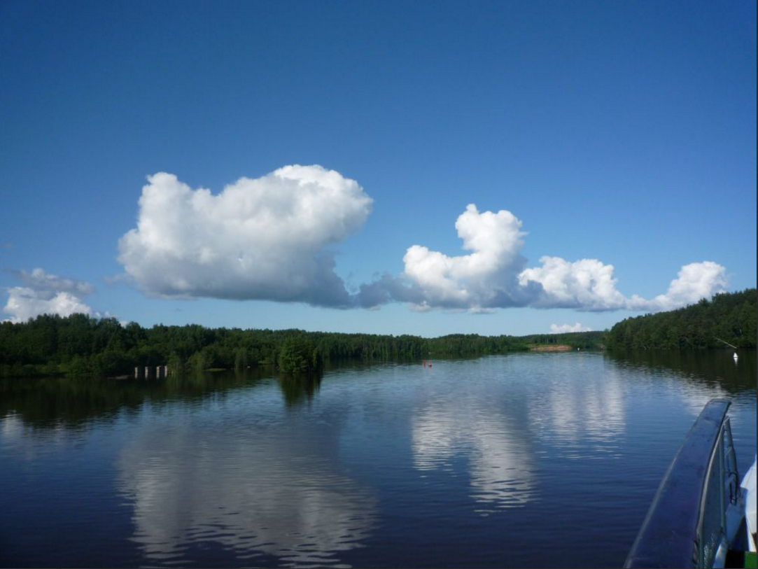 Şeksna çayı